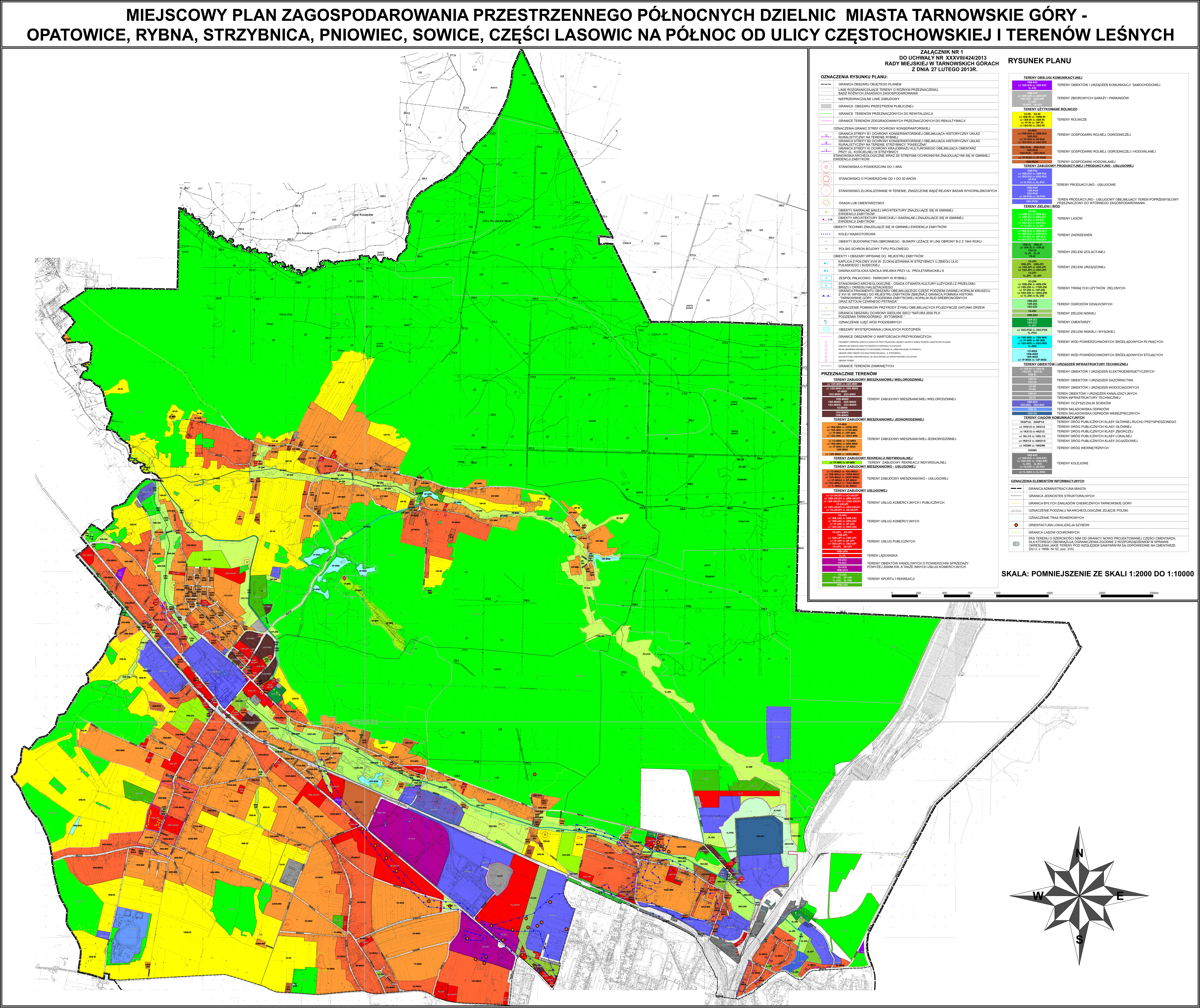 Miejscowy plan zagospodarowania przestrzennego północnych dzielnic miasta Tarnowskie Góry – Opatowice, Rybna, Strzybnica, Pniowiec, Sowice, części Lasowic na północ od ulicy Częstochowskiej i terenów leśnych.